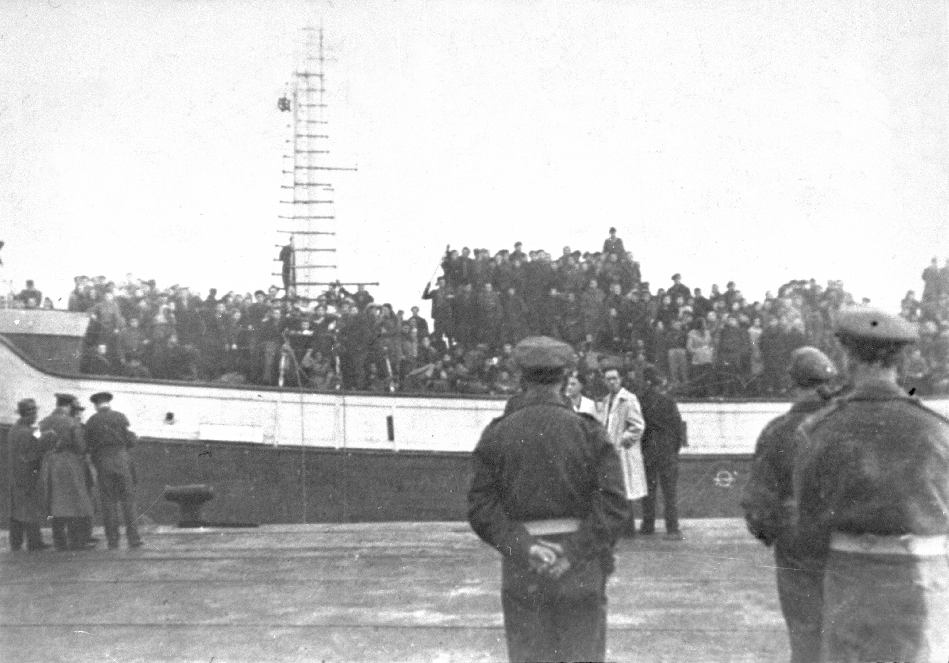 אונית המעפילים אנצו סירני בנמל חיפה לפני הורדת העולים